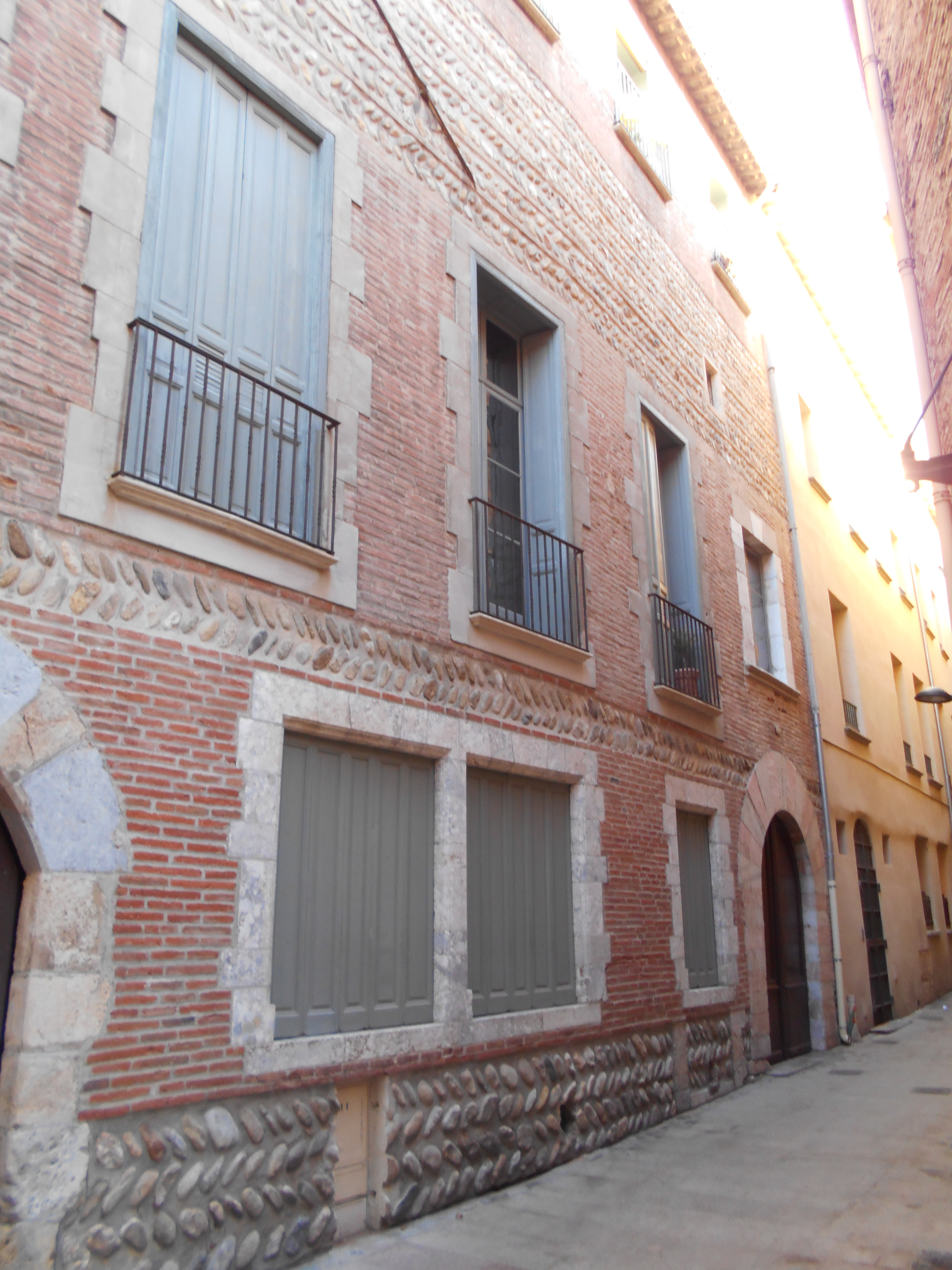 Façana de Casa Julià de Perpinyà